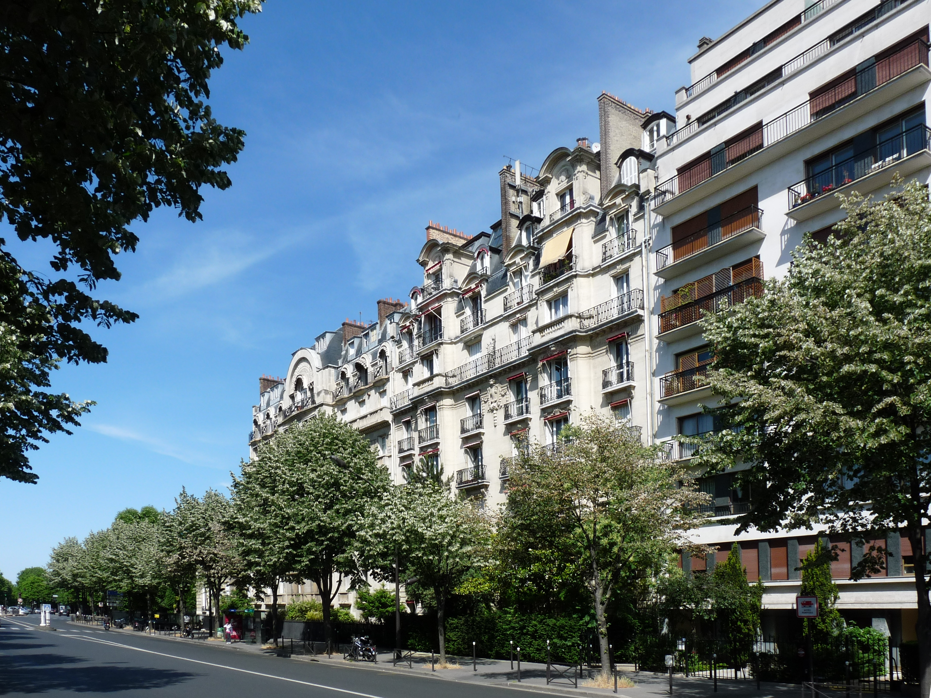 Le Boulevard Suchet à Paris, vue en direction du nord.